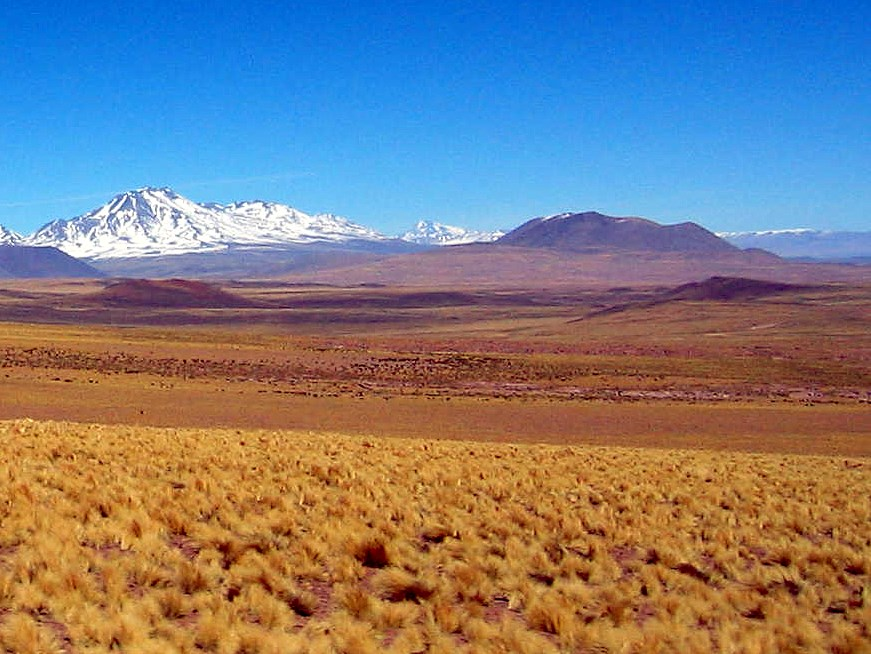 Los volcanes Pular y Toloncha, en el Altiplano de San Pedro de Atacama, Chile.